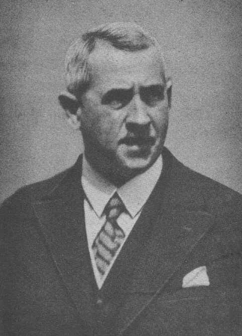 Hugo Kubát, český správním úředník a zemský prezident pro Zemi Českou.